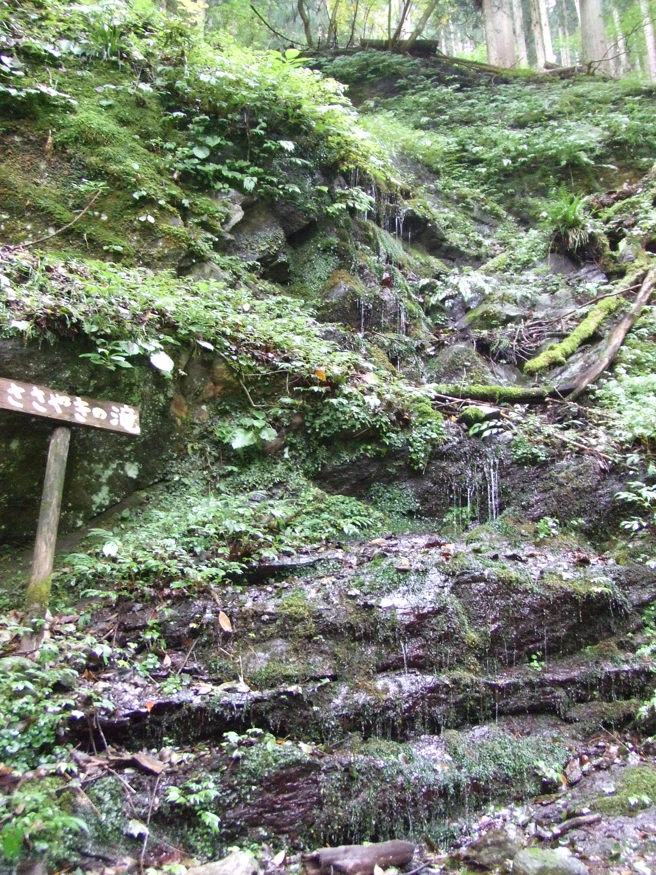 埼玉県秩父市ささやきの滝（2012年9月）